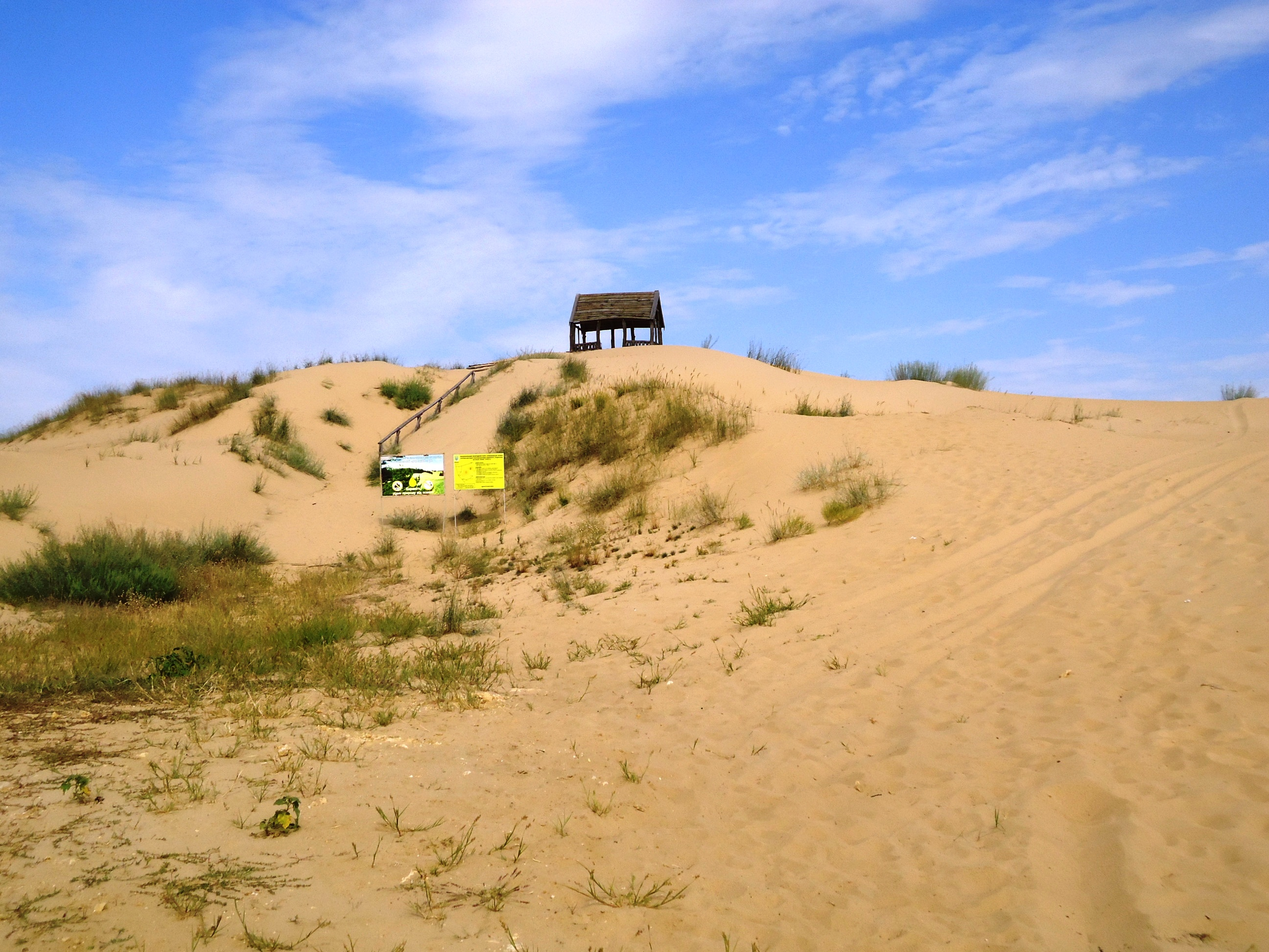 Олешківські піски.Оглядовий майданчик з боку с.Раденськ / Oleshky Sands.Observation platform near village Radens'k